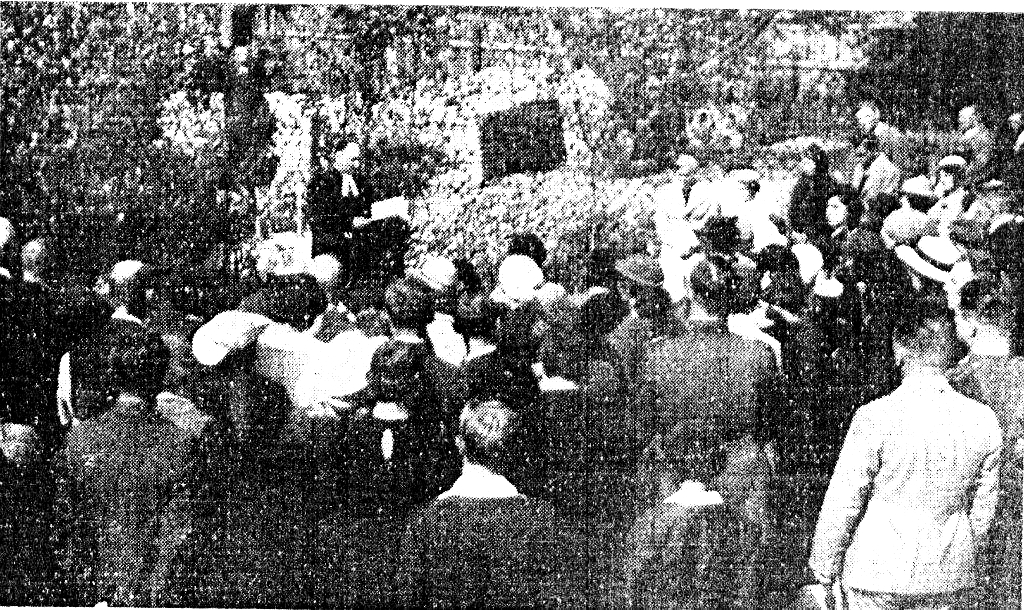 Ks. Alfred Hugo Figaszewski podczas konsekracji kościoła ewangelickiego w Brześciu